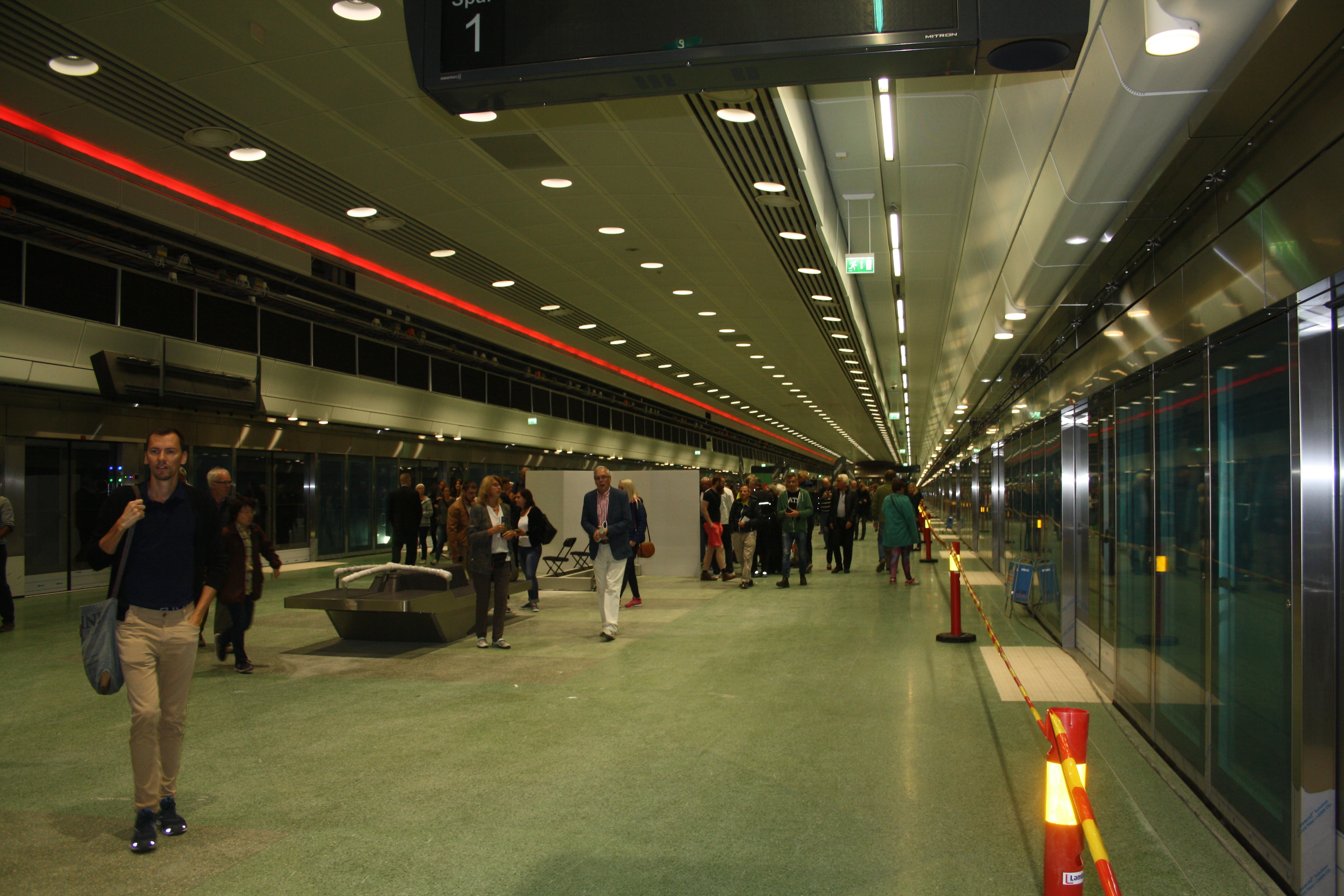 Plattformen i Odenplan